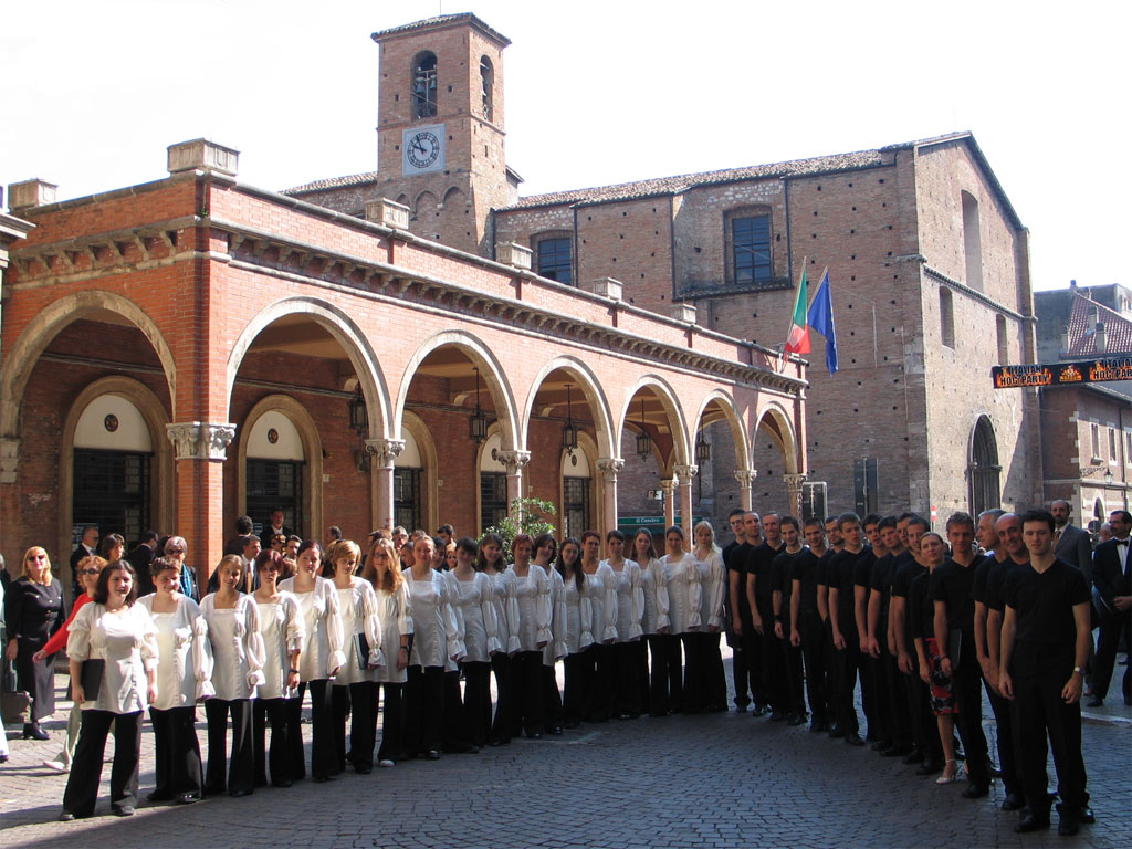 Fotografija Zbora svetega Nilolaja Litija iz gostovanja v Italiji (Teramo, Pescara), septembra 2005.